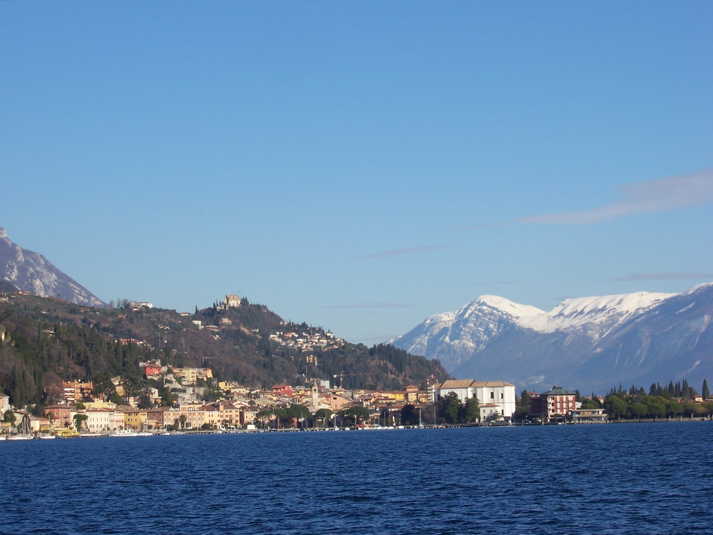 Toscolano Maderno in provincia di Brescia Italia